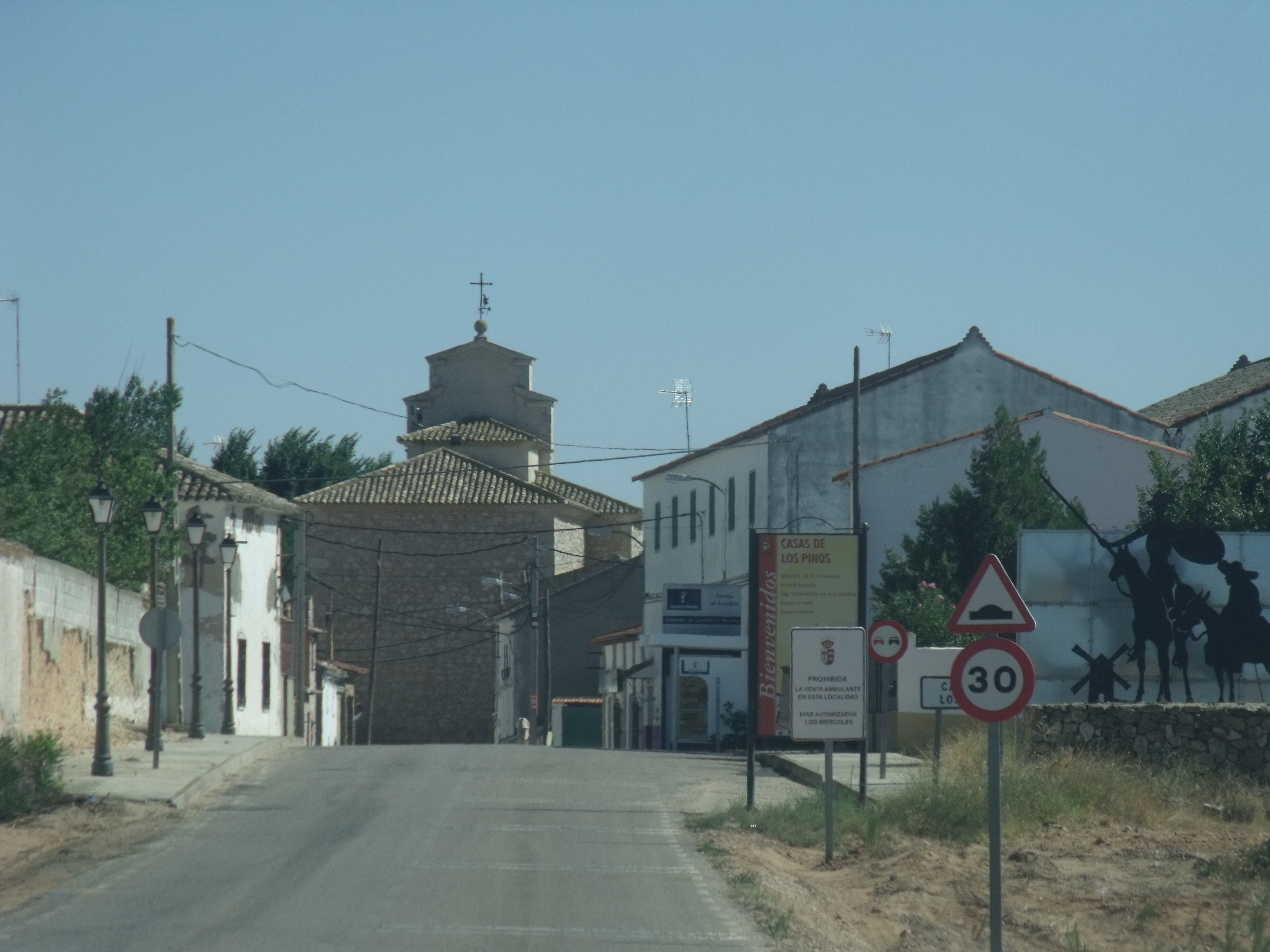 Entrada al pueblo